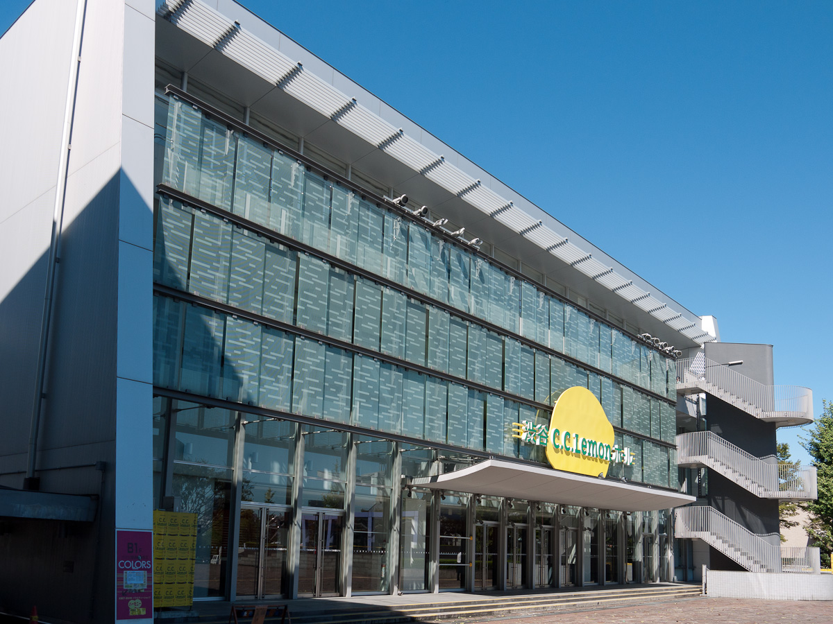 渋谷公会堂（渋谷CC-Lemonホール）、渋谷区宇田川町。